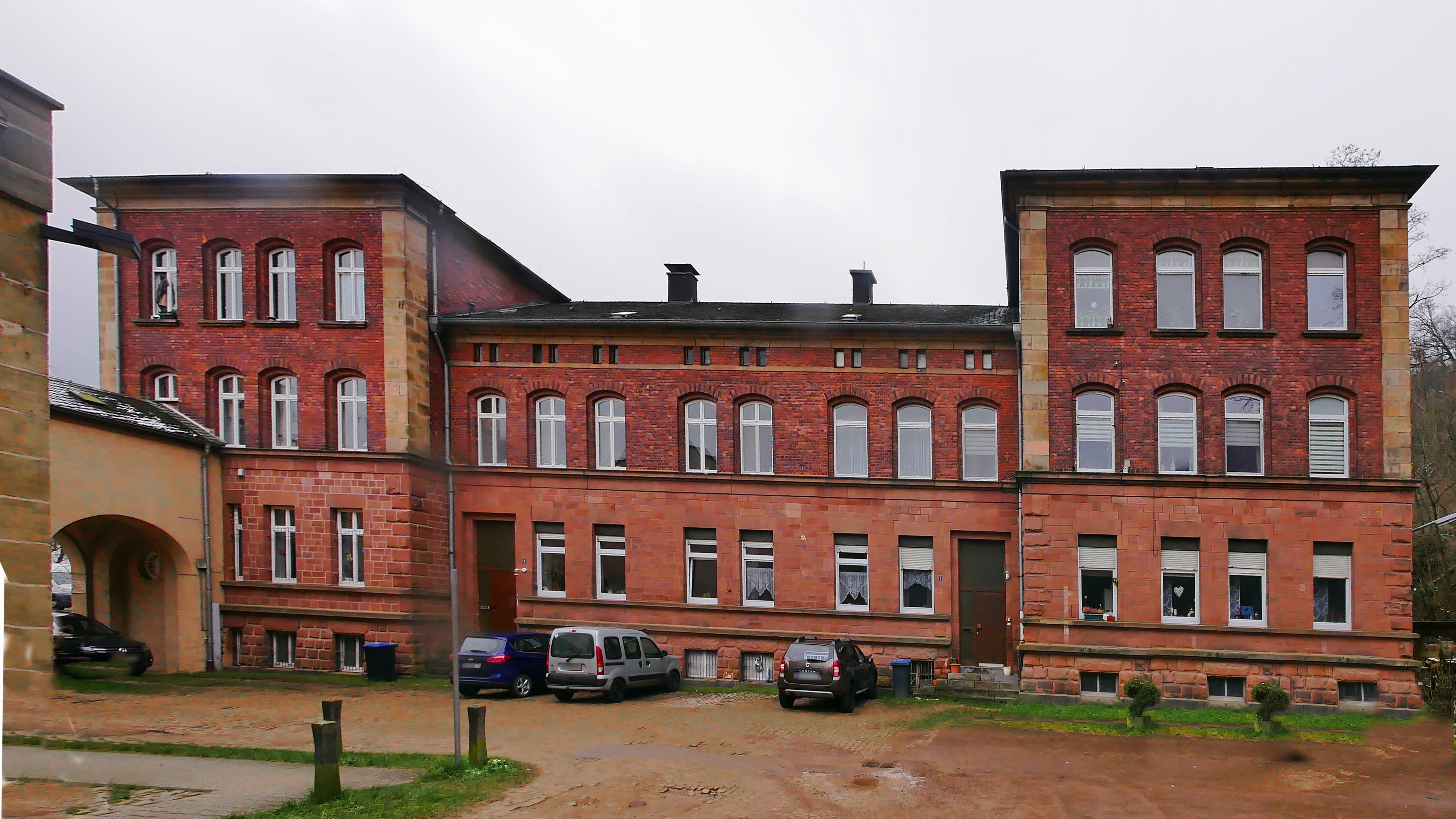 ehmalige Horkaserne Trier, erhaltenes Gebäude (heute) Christ-König-Platz 1 bis 3